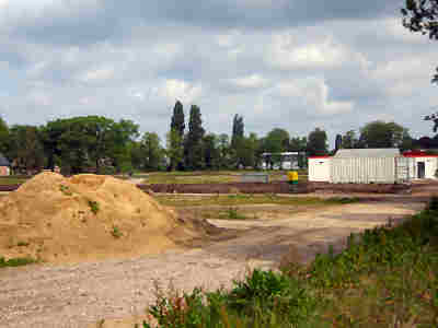 De Vulcanusbuurt in wording.